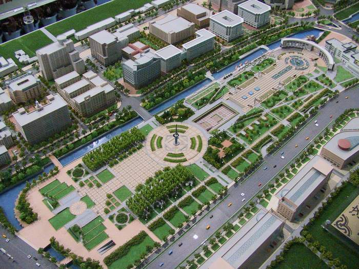 中文（中国大陆）: 泉城广场规划模型